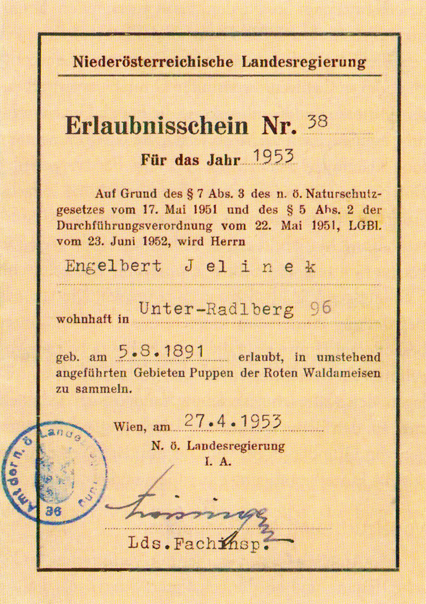 Niederösterreichische Landesregierung - Erlaubnisschein Nr. 38 für den Ameisler Engelbert Jelinek